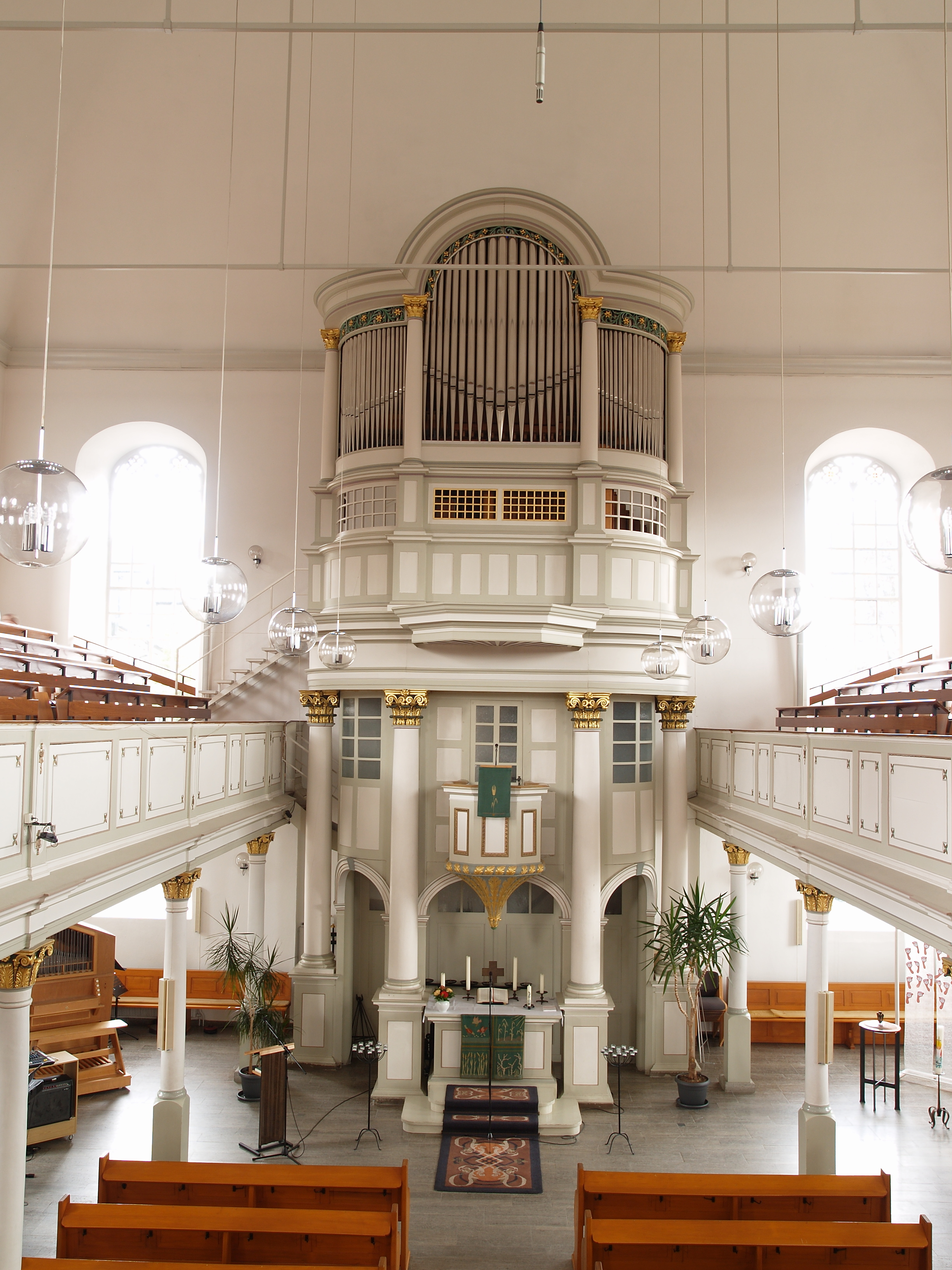 Blick von der Empore auf den Innenraum mit Altar, Kanzel und Orgel.